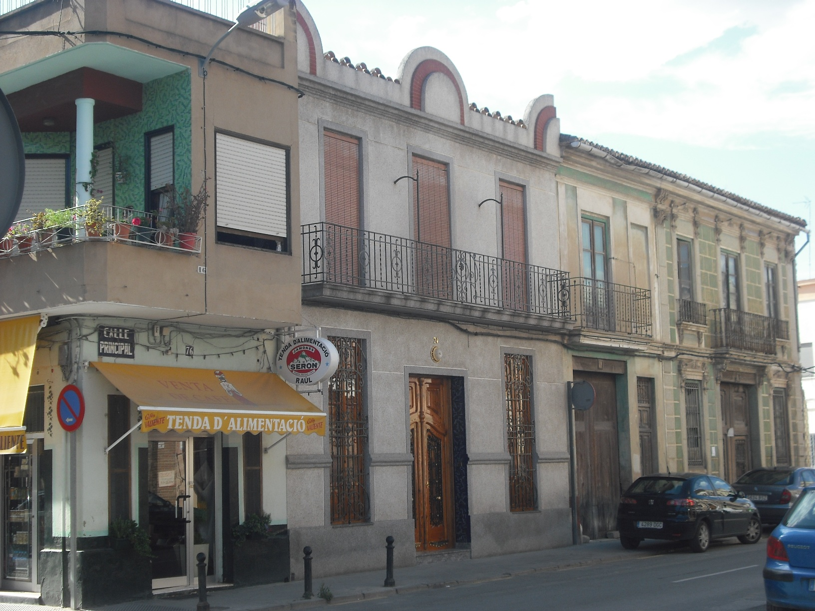 Cantó del carrer Principal amb el carrer Alqueria d'Aznar de Castellar.